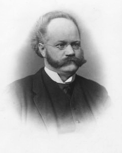 Leopold von Schroeder